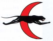 Divisionsemblem för tredje divisionen Petter Röd Emblemet pryds med en svart panter som symbol framför månskäran. Den svarta pantern symboliserade nattjaktskapacitet som fanns på divisionen. Halvmånens färg är ursprungligen gul, men bytes till rött när divisionen överfördes från F 1 till F 16 år 1983.